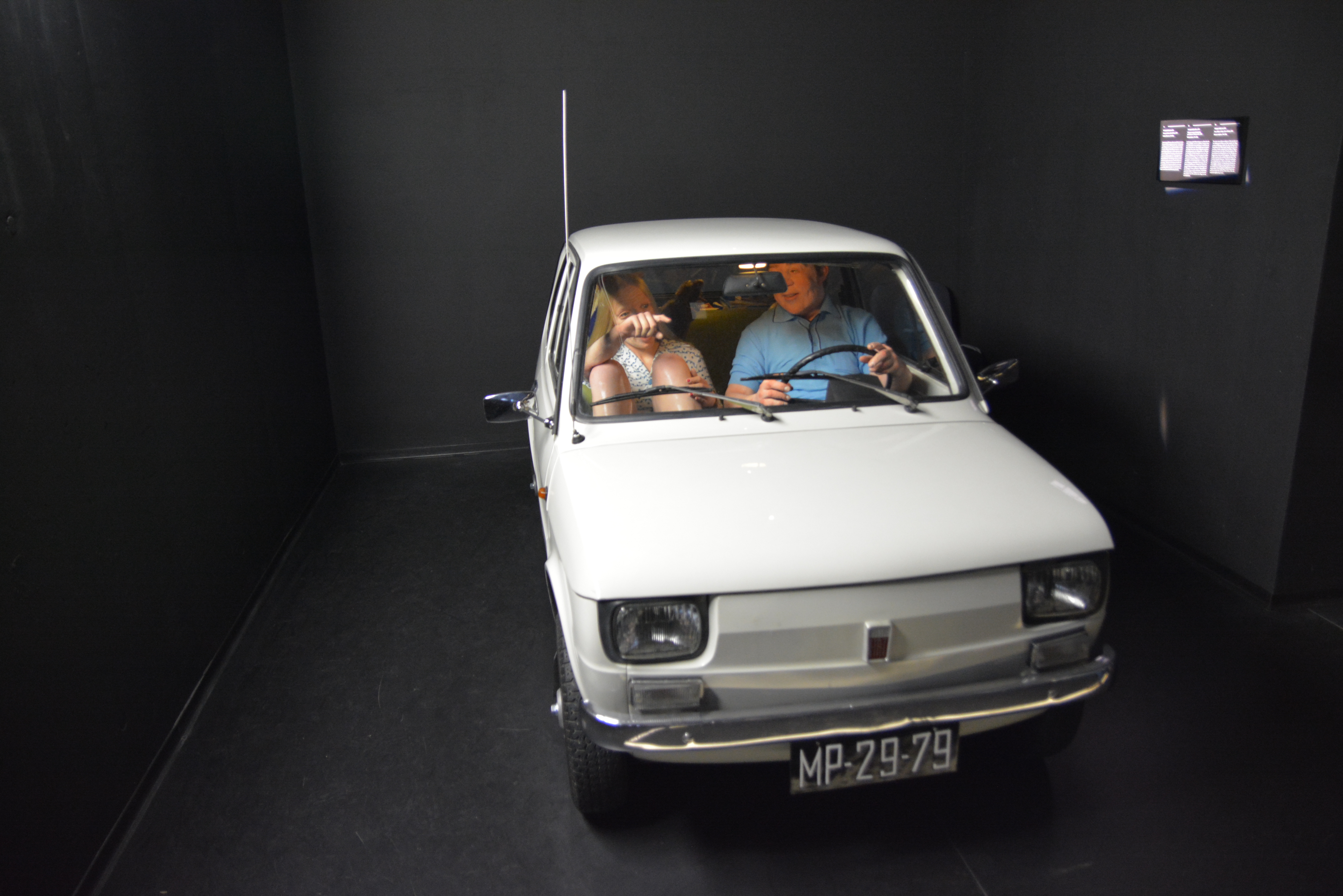 Centrum Dialogu Przełomy - Oddział Muzeum Narodowego w Szczecinie